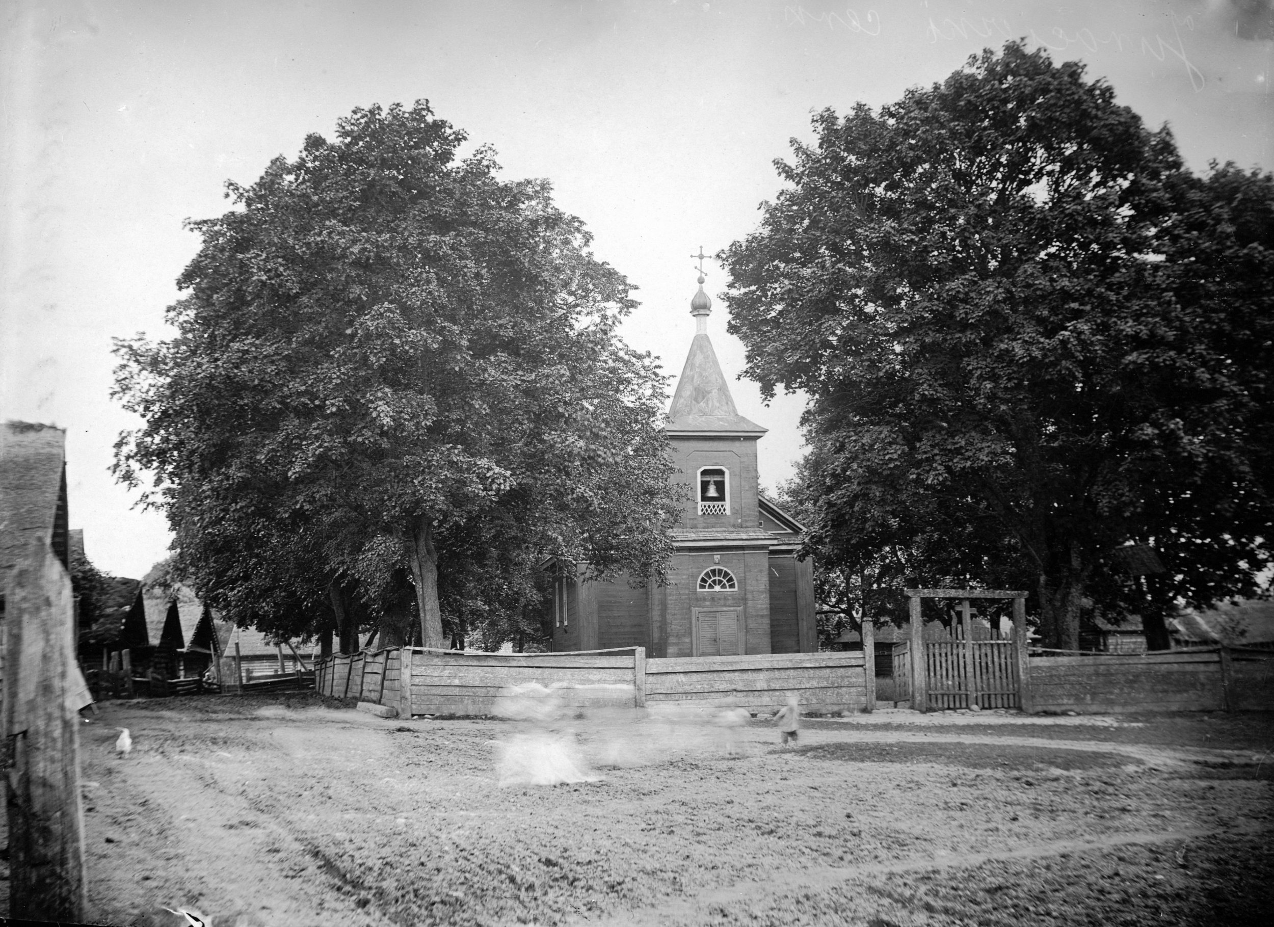 Беларуская (тарашкевіца): Юрацішкі (Juraciški), вуліца Трабская (vulica Trabskaja). Мікольская царква